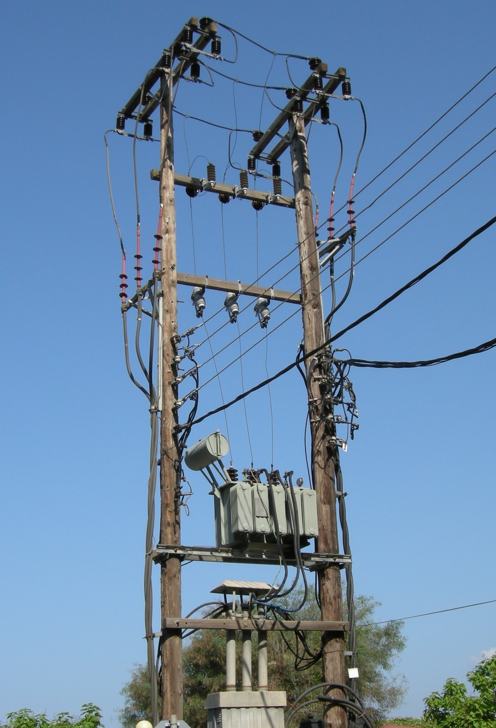 Een keur aan isolators in Griekenland